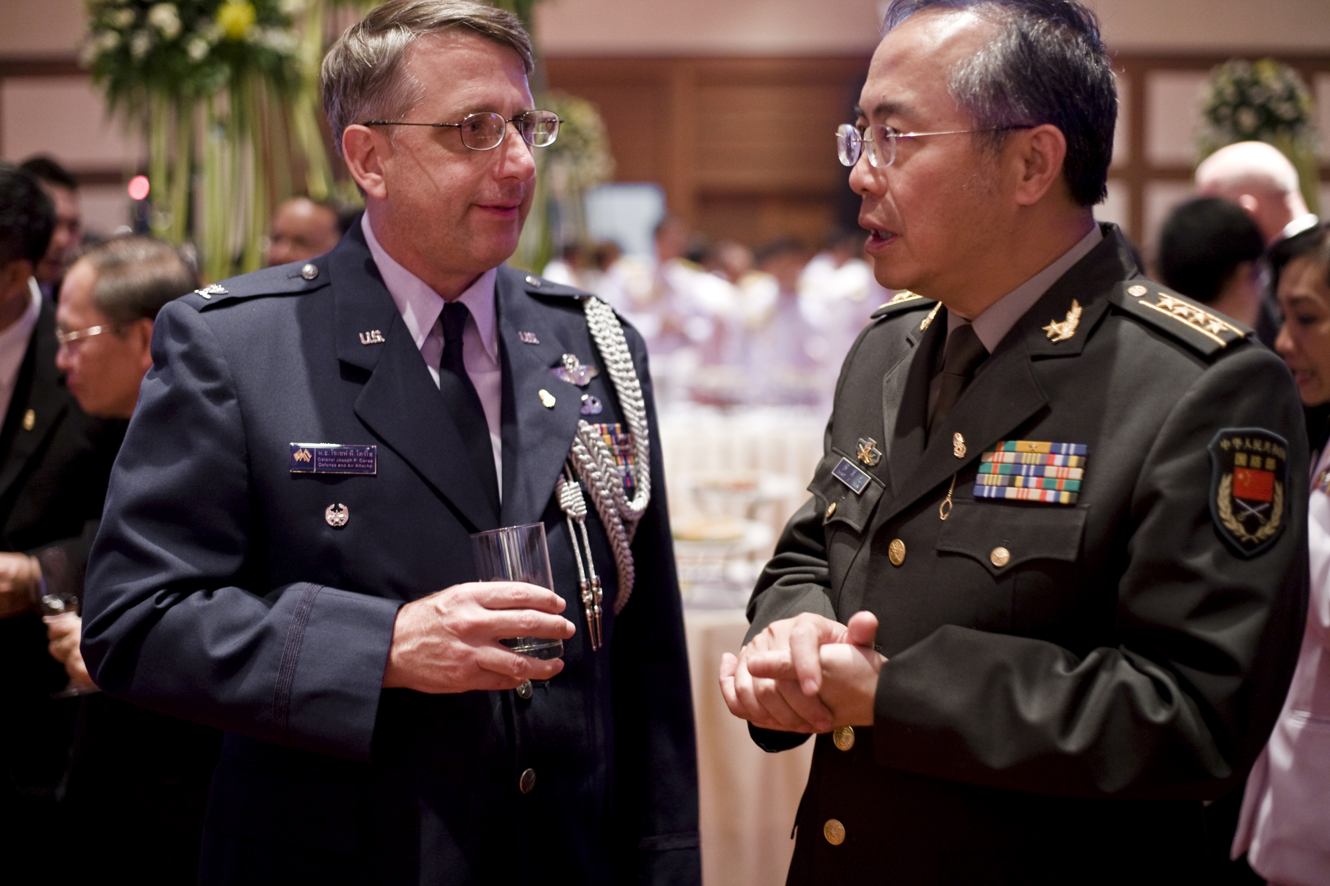 นายกรัฐมนตรี ร่วมงานเลี้ยงรับรองเนื่องในวันกองทัพบก ณ ห้องมัฆวานรังสรรค์ สโมสรทหารบก ถนนวิภาวดีรังสิต กรุงเทพฯ 20 มกราคม 2553 (The Official Site of The Prime Minister of Thailand Photo by พีรพัฒน์ วิมลรังครัตน์)